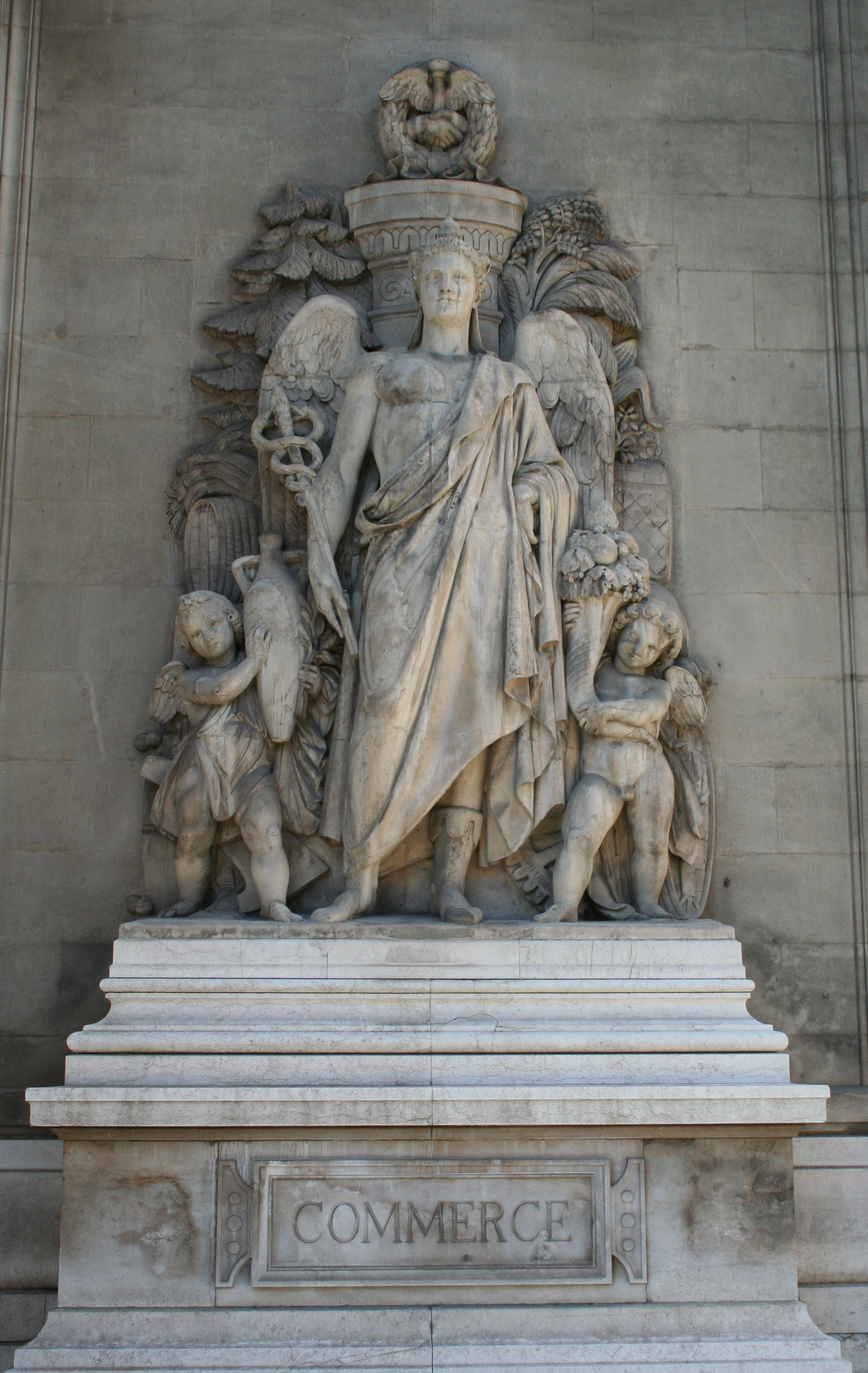 Palais de la bourse à Marseille, statue du commerce sculptée par Guillaume.